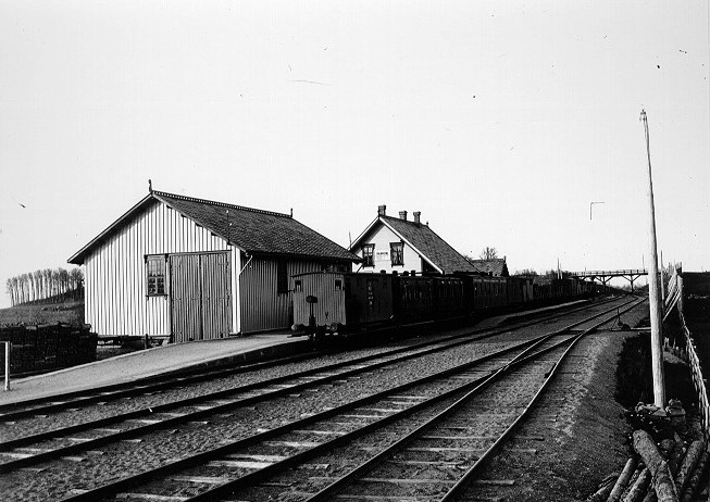 Ranheim stasjon etter 1881. Foto: Erik Olsen/NTNU UB. ID: O-I-0379_01.